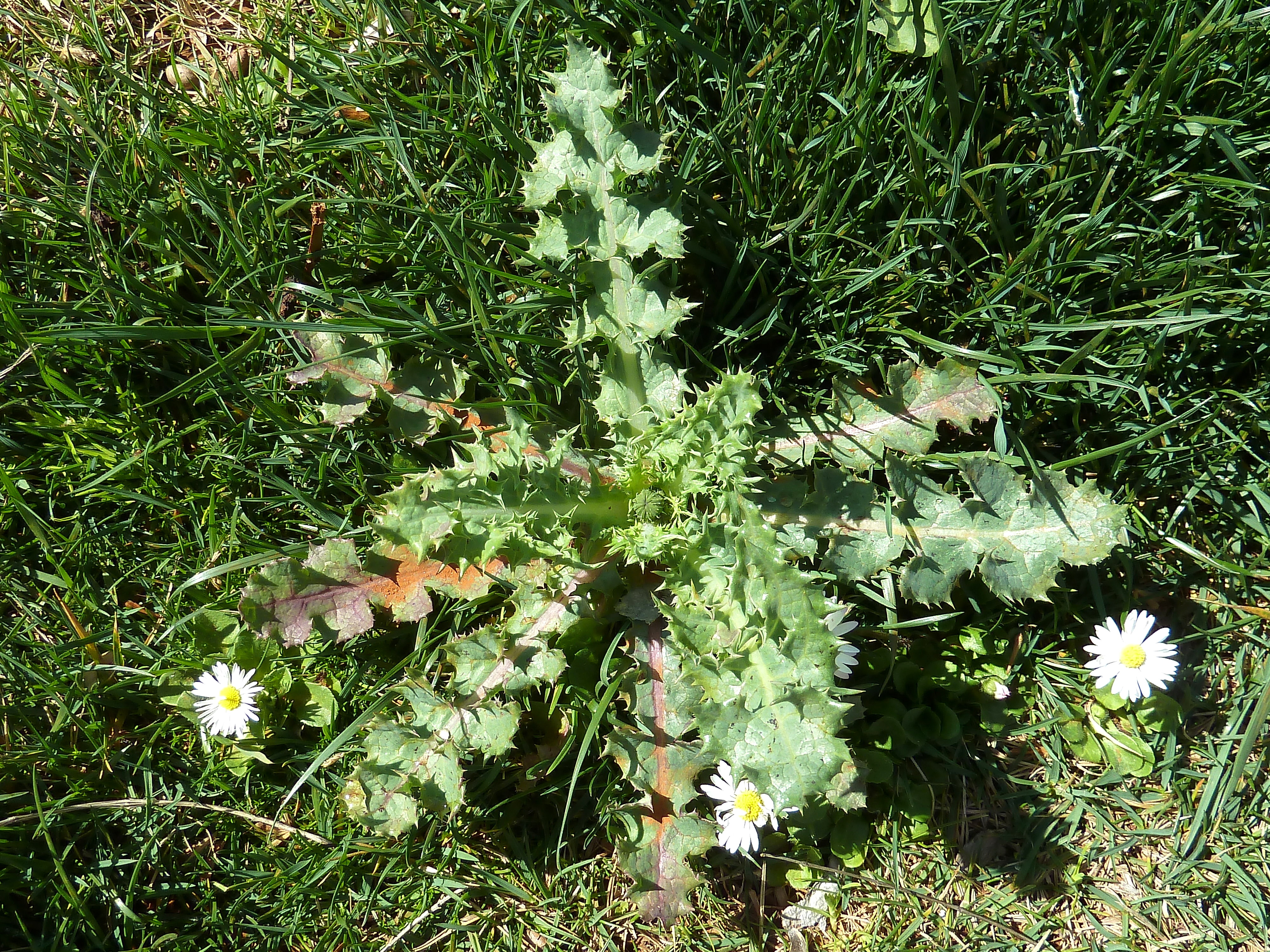 Sonchus asper (cerraja) - Roseta basal de hojas con escape central incipiente. - Jardinera en la Plaza de Roma (hoy día Manuel Becerra), esquina con c/. Gómez Ulla, Madrid (España).